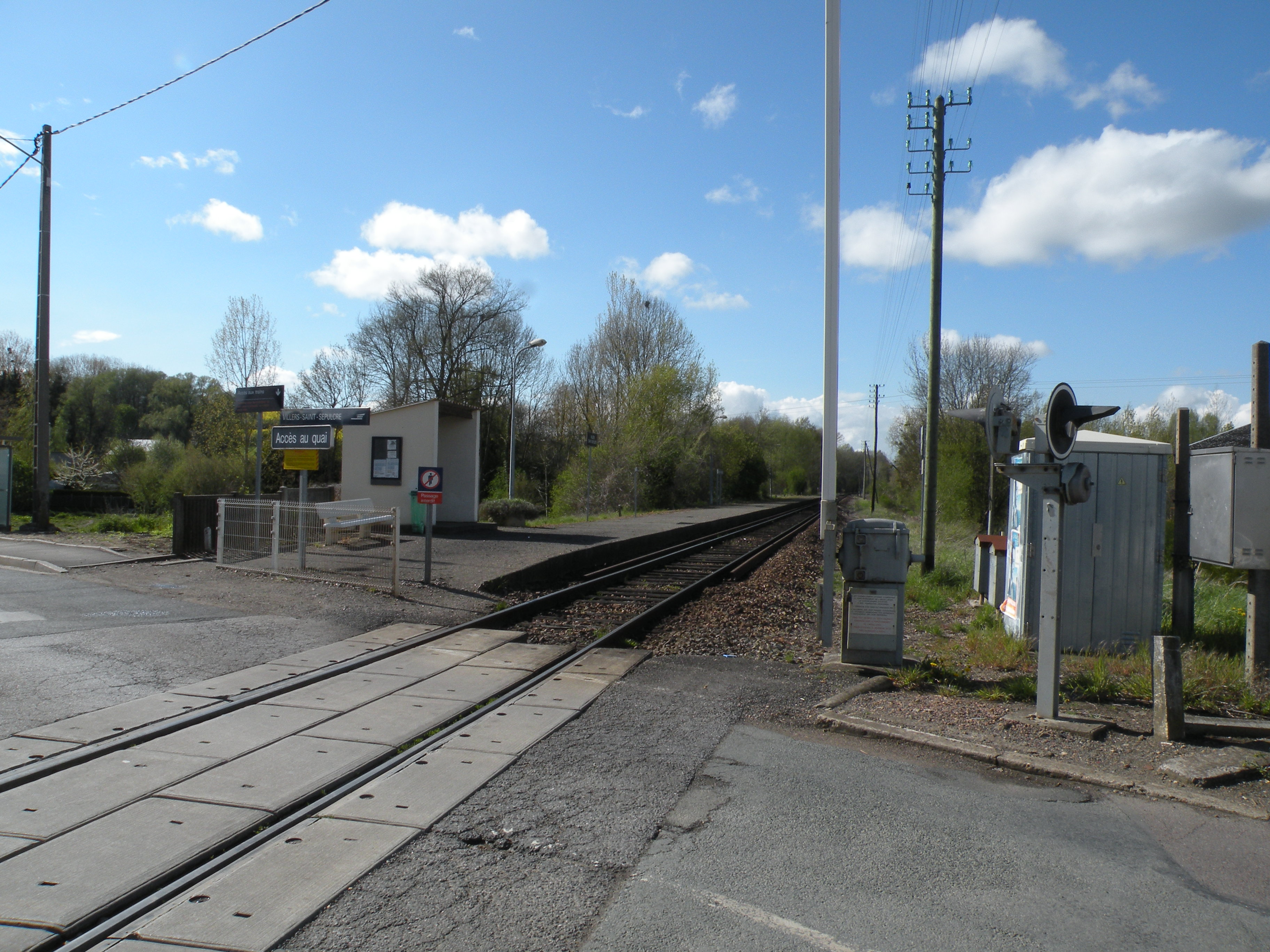 gare de Villers-Saint-Sépulcre